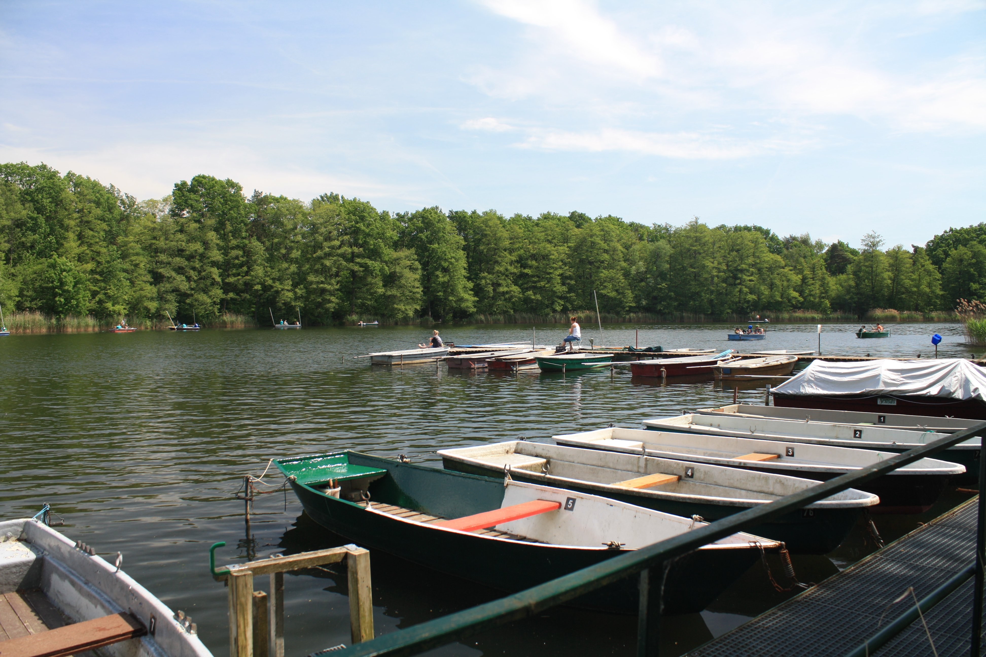 Boote am Krummen See in Krummensee, Schenkendorf, Mittenwalde, BrandenburgBrandenburg, Deutschland.